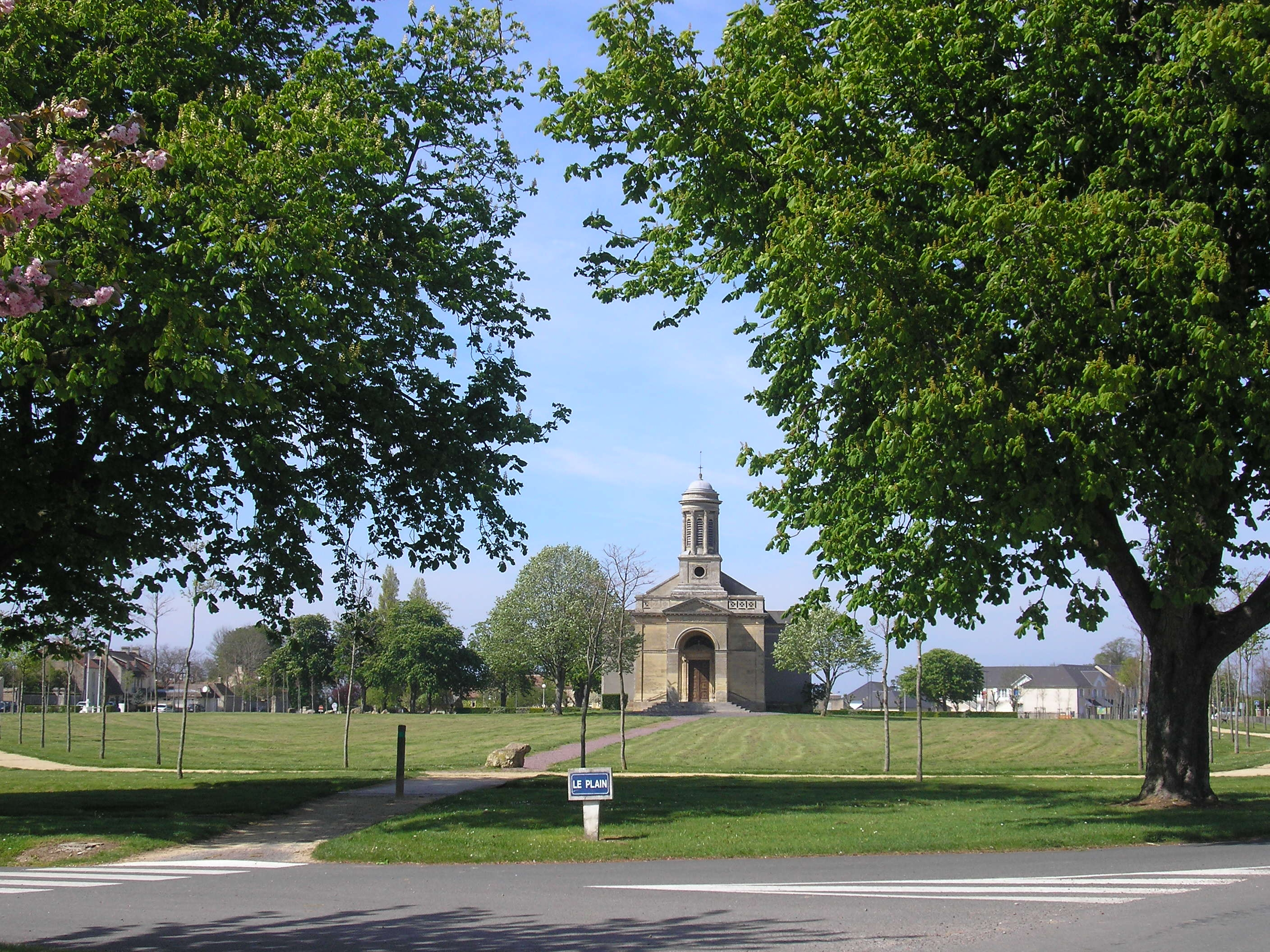 Amfreville (Calvados, Normandie, France). Le Plain, avec en son centre l'église Saint-Martin.